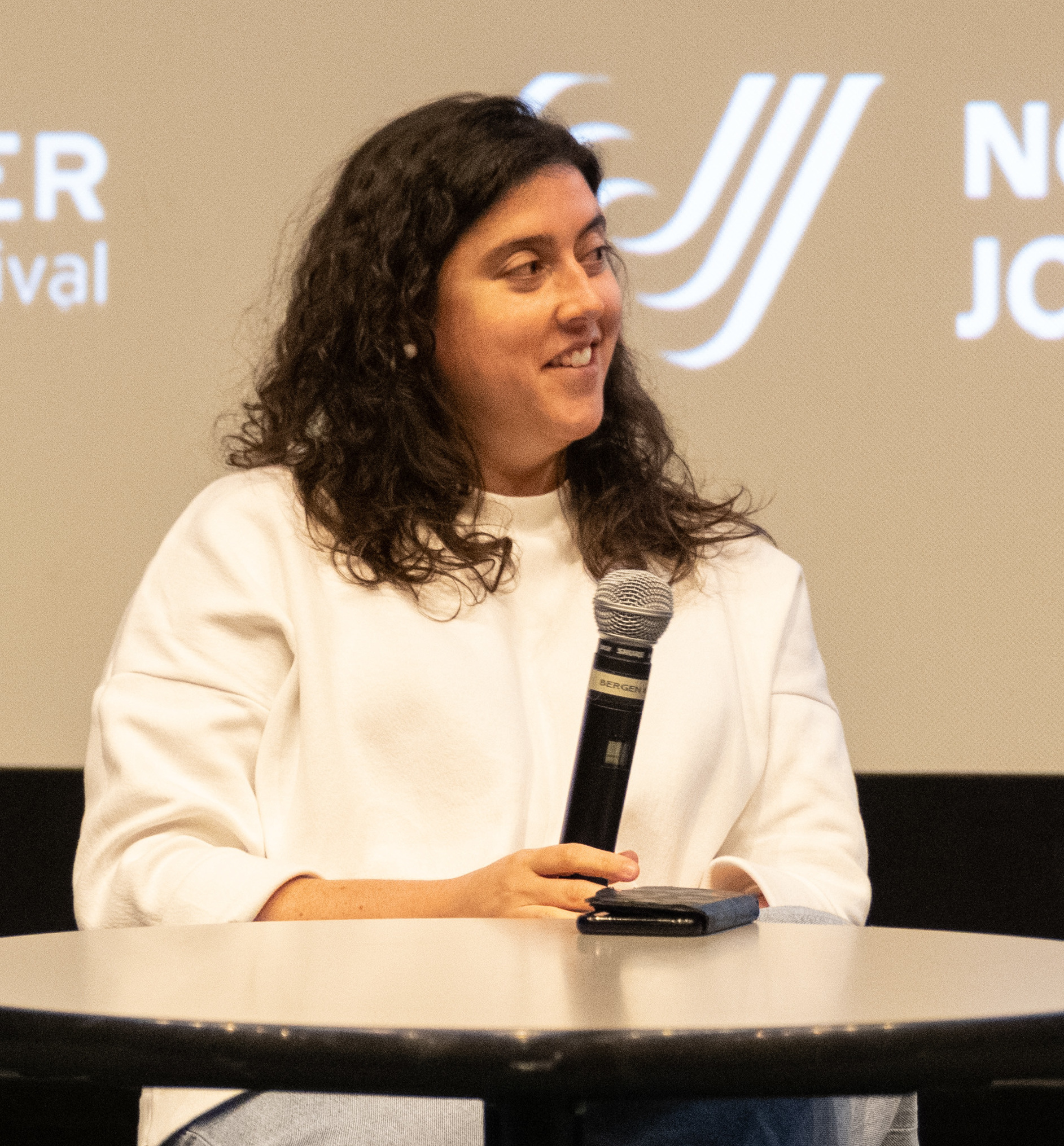 Alison Klayman